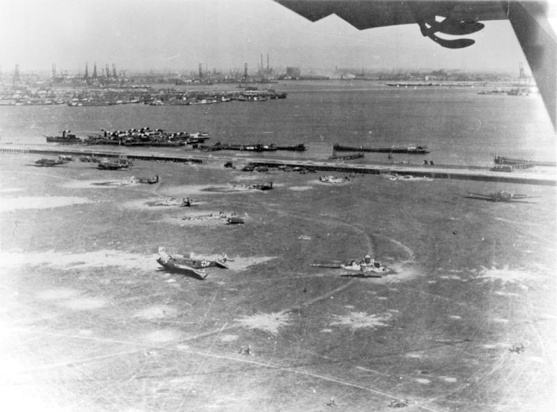 Luftlandung Holland, zerstörte Ju 52 auf dem Flugplatz Waalhaven-dahinter Rotterdam